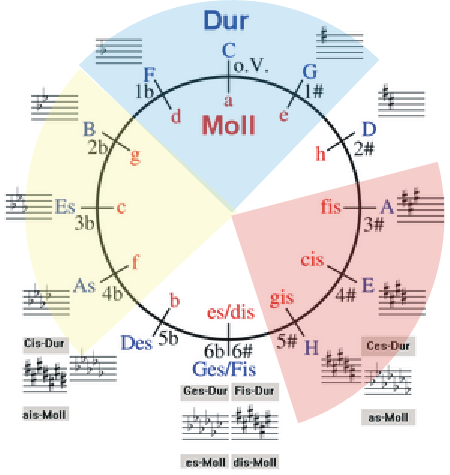 Quintenzirkel Kadenzen für C-Dur (blau), E-Dur (rot) sowie Es-Dur (gelb)